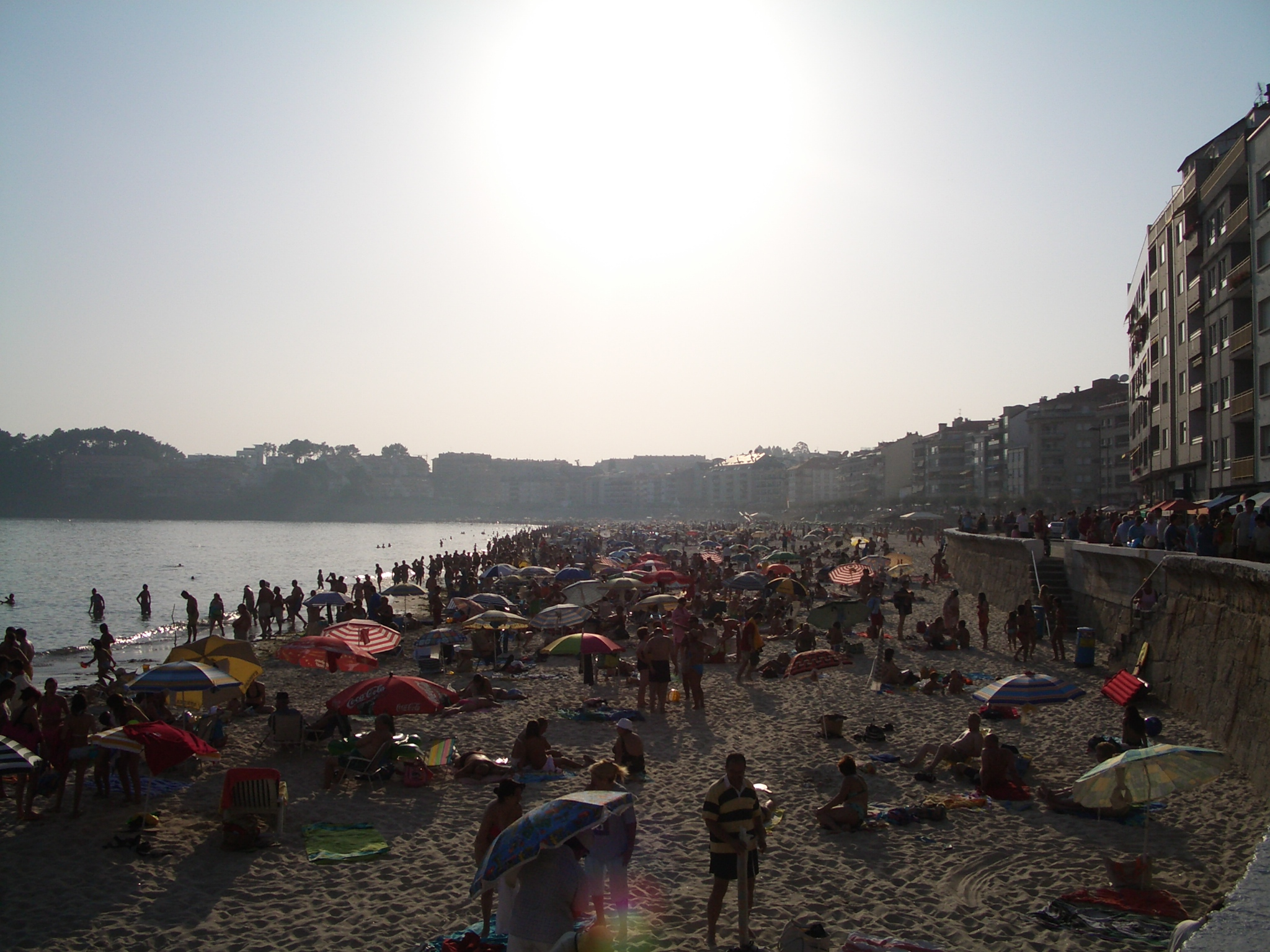 Foto da praia de Silgar en Sanxenxo (Galiza)